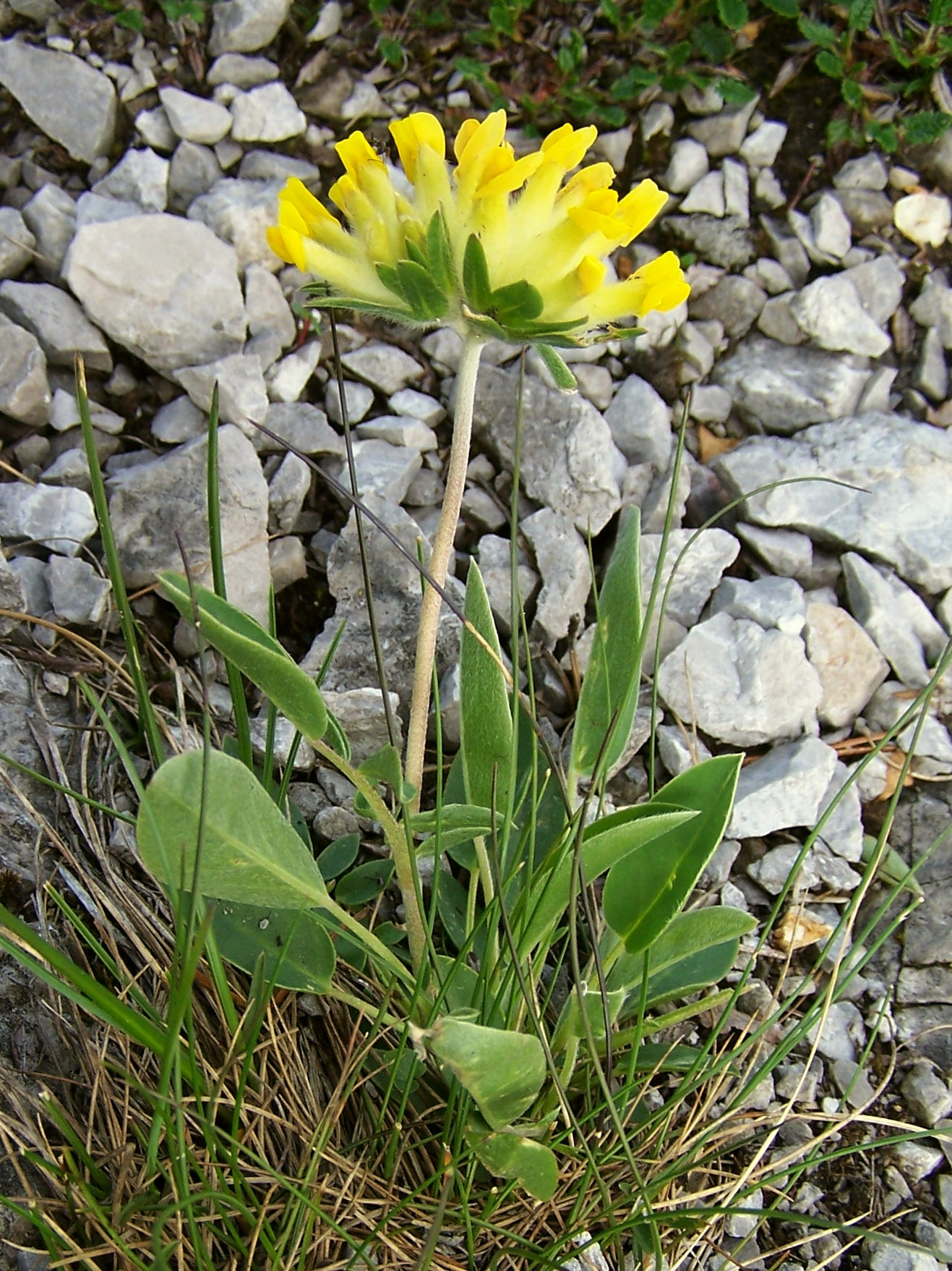 Anthyllis alpestris (pl. przelot alpejski), habitat: Tatra Mountains, Hala Upłaz